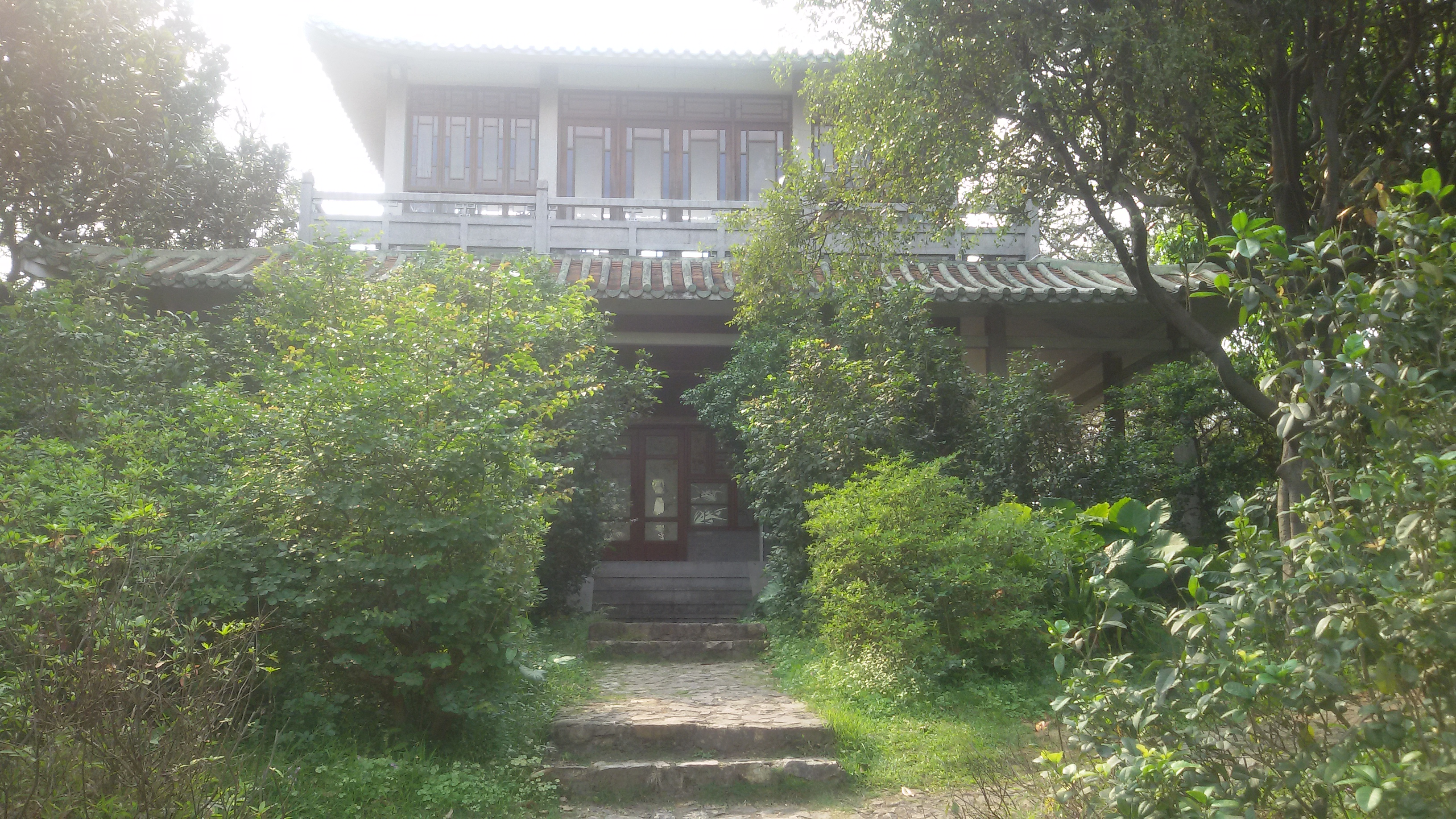 粵語: 白雲山嘅桃花澗景區入面嘅明珠樓